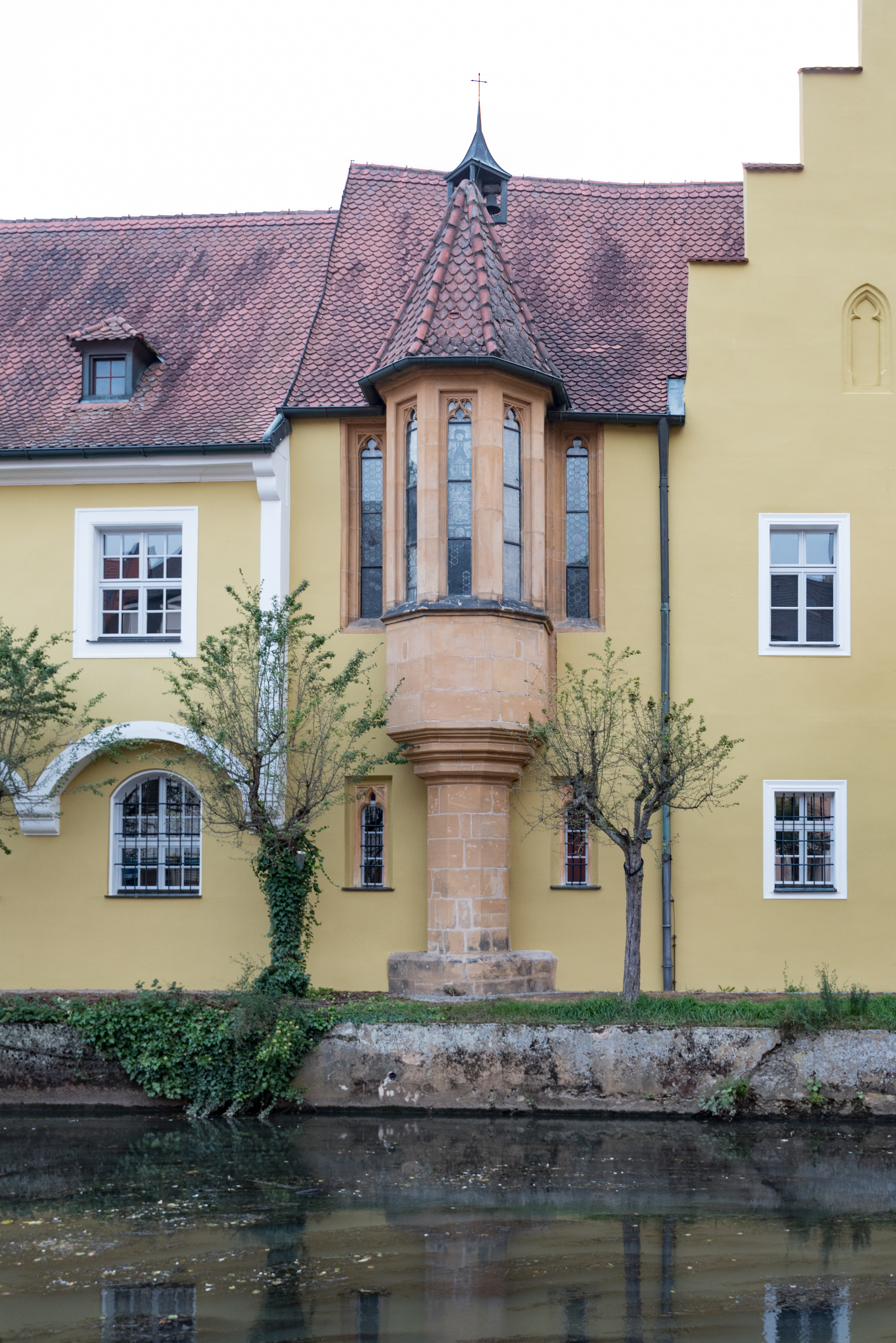 Amberg, Eichenforstgäßchen 12